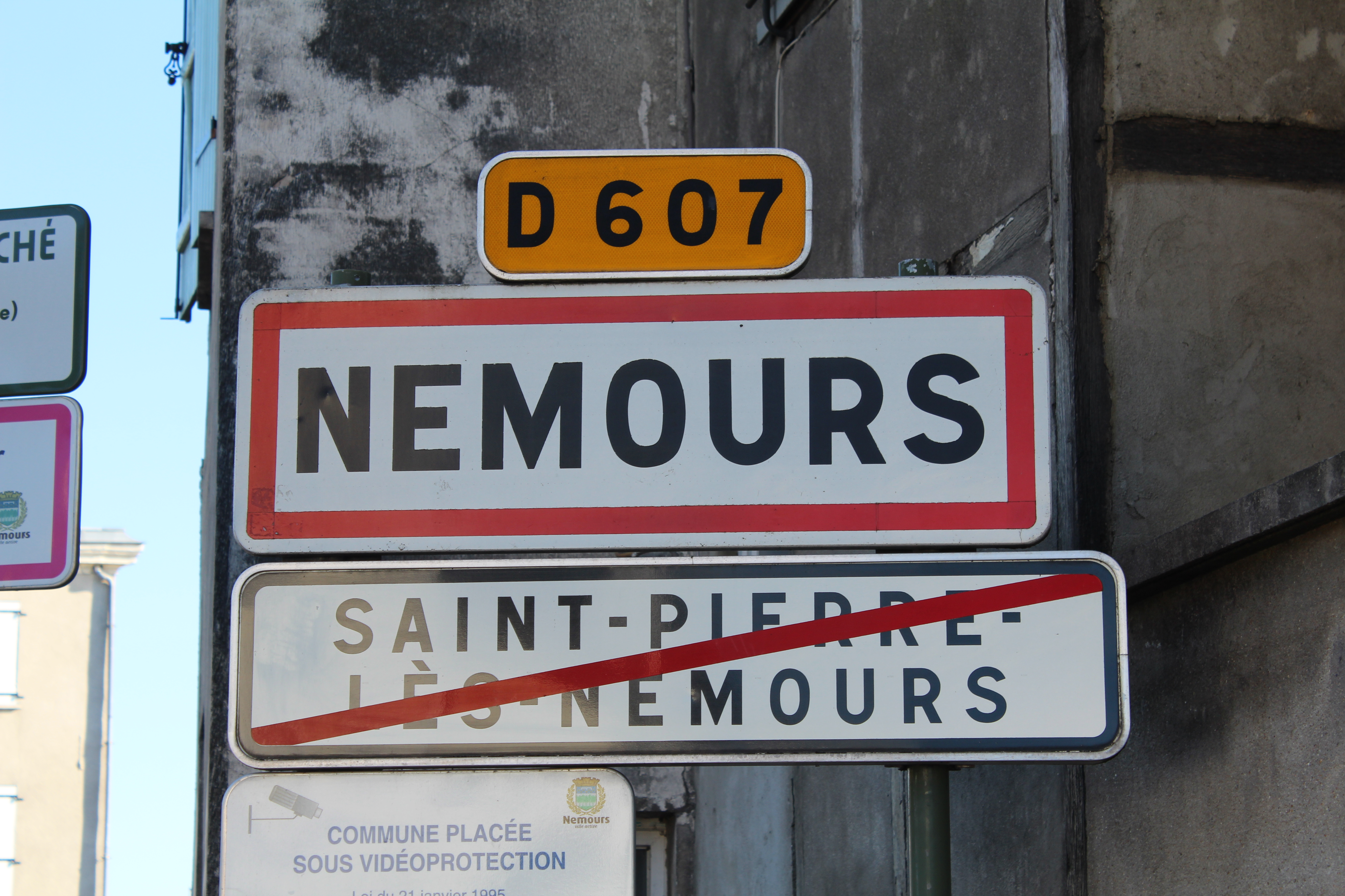 Panneau d'entrée dans Nemours et de sortie de Saint-Pierre-lès-Nemours.